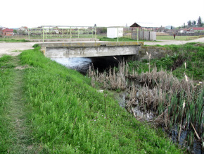 Turda - punte peste Valea Caldă Mare in zona str. A.I.Cuza